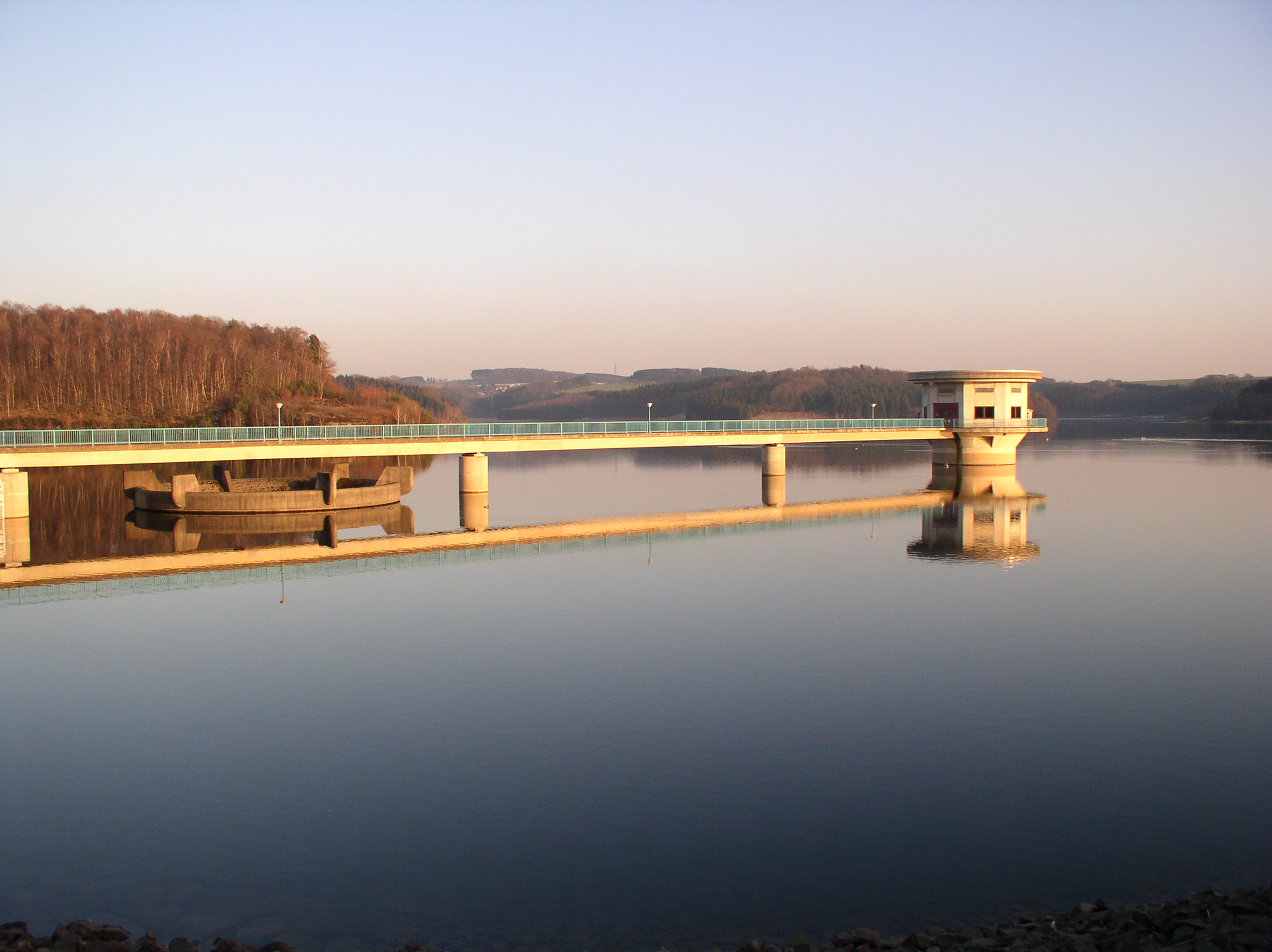 Dhünntalsperre, Wasserentnahmeturm und Überlauftrichter